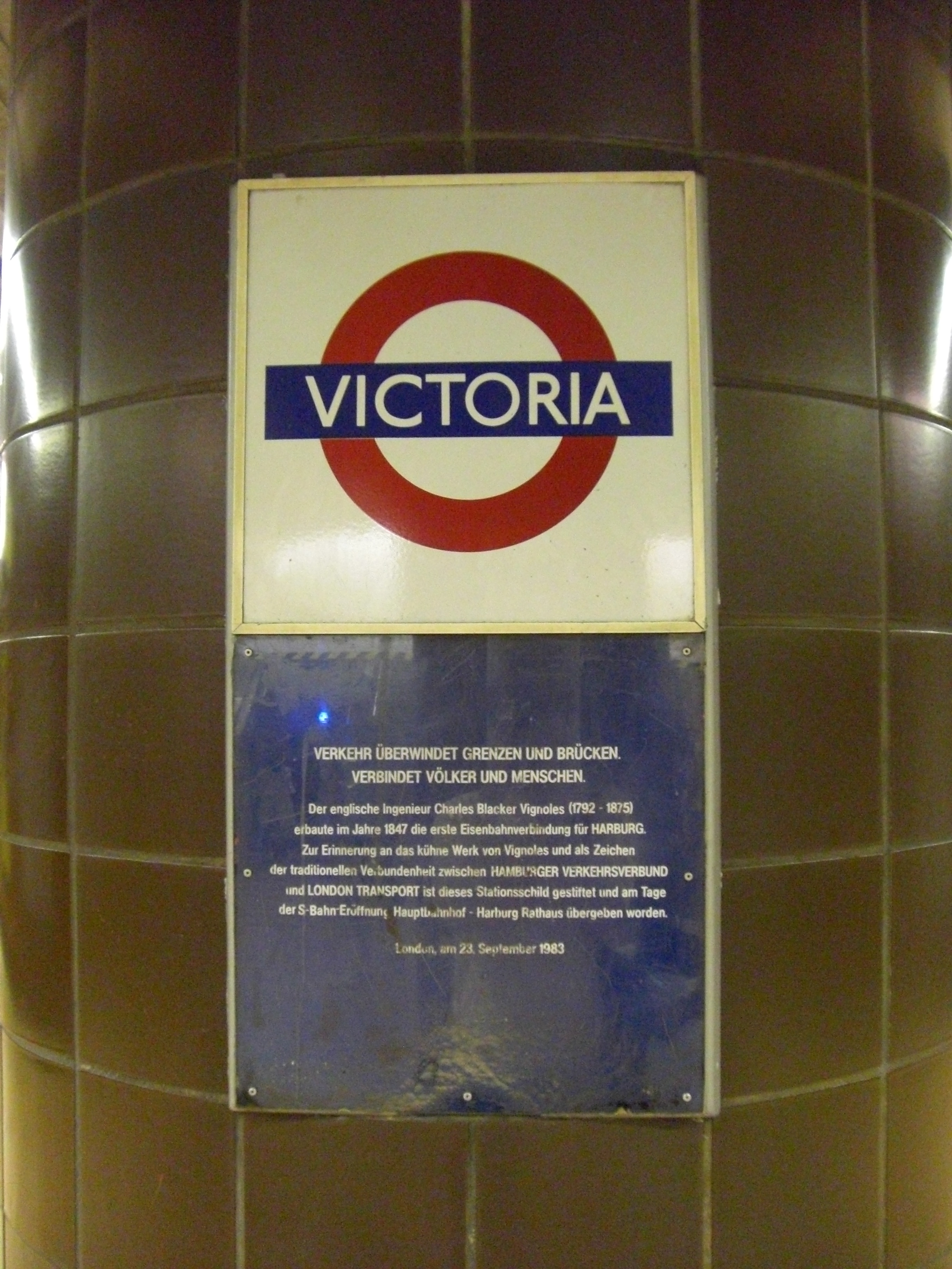 Gedenktafel der Londoner Verkehrsbetriebe in der S-Bahnstation Harburg.